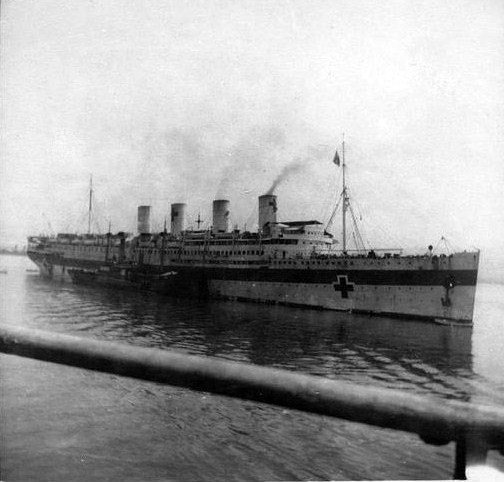 le Navire_hôpital_La_France.